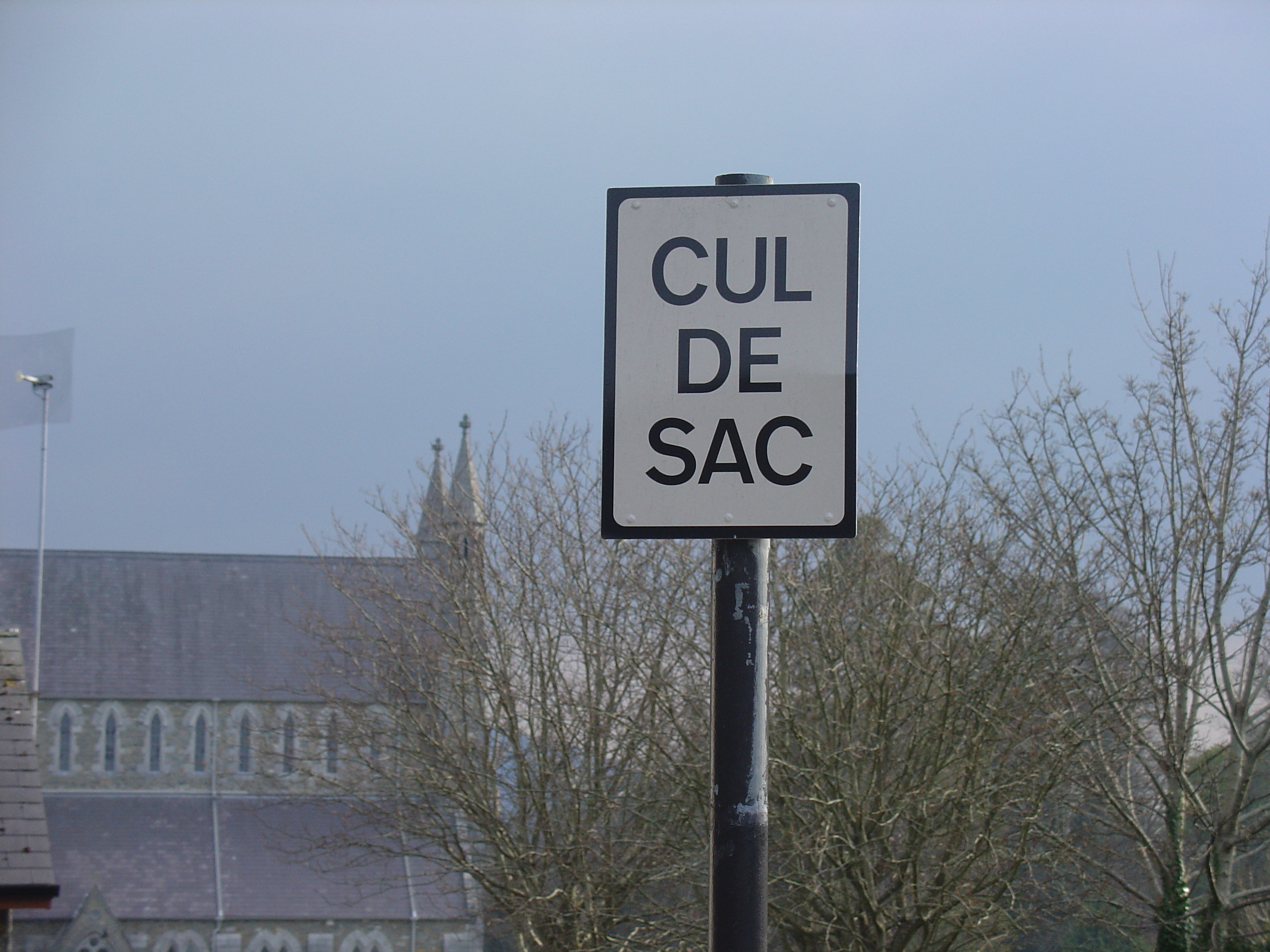 Dublin's Cul de Sac